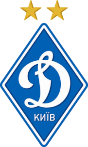 Емблема ФК «Динамо» Київ з липня 2011 року